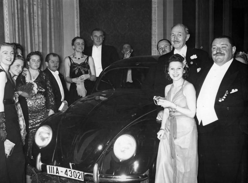 Ferdinand Porsche, Heinrich George mit VW Presseball 1939 Der Volkswagen, der den Hauptgewinn der Tombola darstellte, stand im Mittelpunkt des Interesses. Rechts Heinrich George neben ihm Bengt Berg, weiter links der Konstrukteur des Volkswagens Dr. [Ferdinand] Porsche mit Frau Elsa Ellinghausen, der glücklichen Gewinnerin. Fot.: Wag 28.1.1939 [Herausgabedatum] [Berlin.- Presseball, KdF-Wagen] Abgebildete Personen: Berg, Bengt: Vogelforscher, Schweden (GND 116129336) George, Heinrich: Intendant des Schiller-Theaters in Berlin, Schauspieler, Deutschland (GND 118690507) Porsche, Ferdinand Prof. Dr. Ing.: Konstrukteur des Volkswagens, Deutschland (GND 118595881)